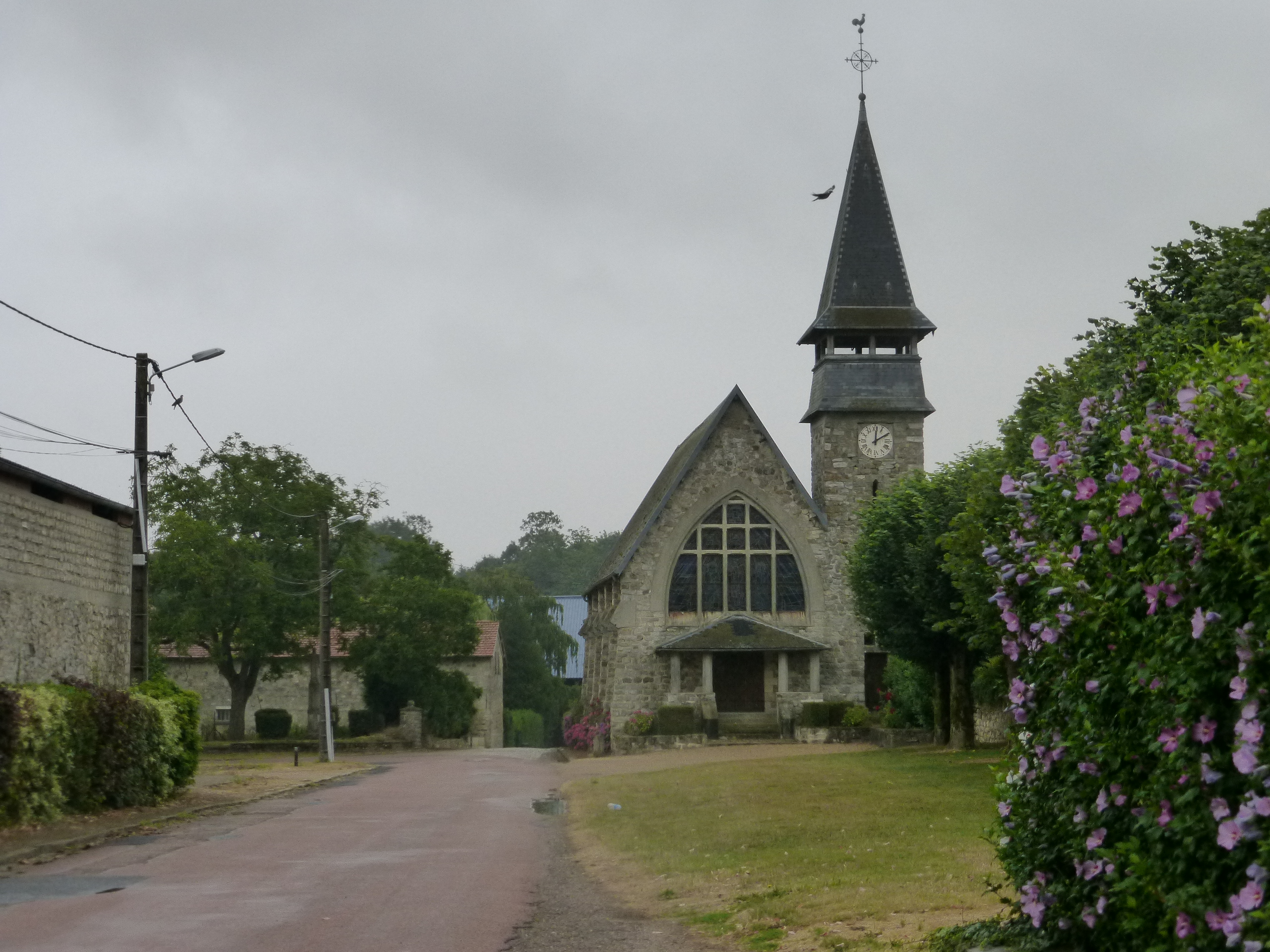 Passy-en Valois - Eglise